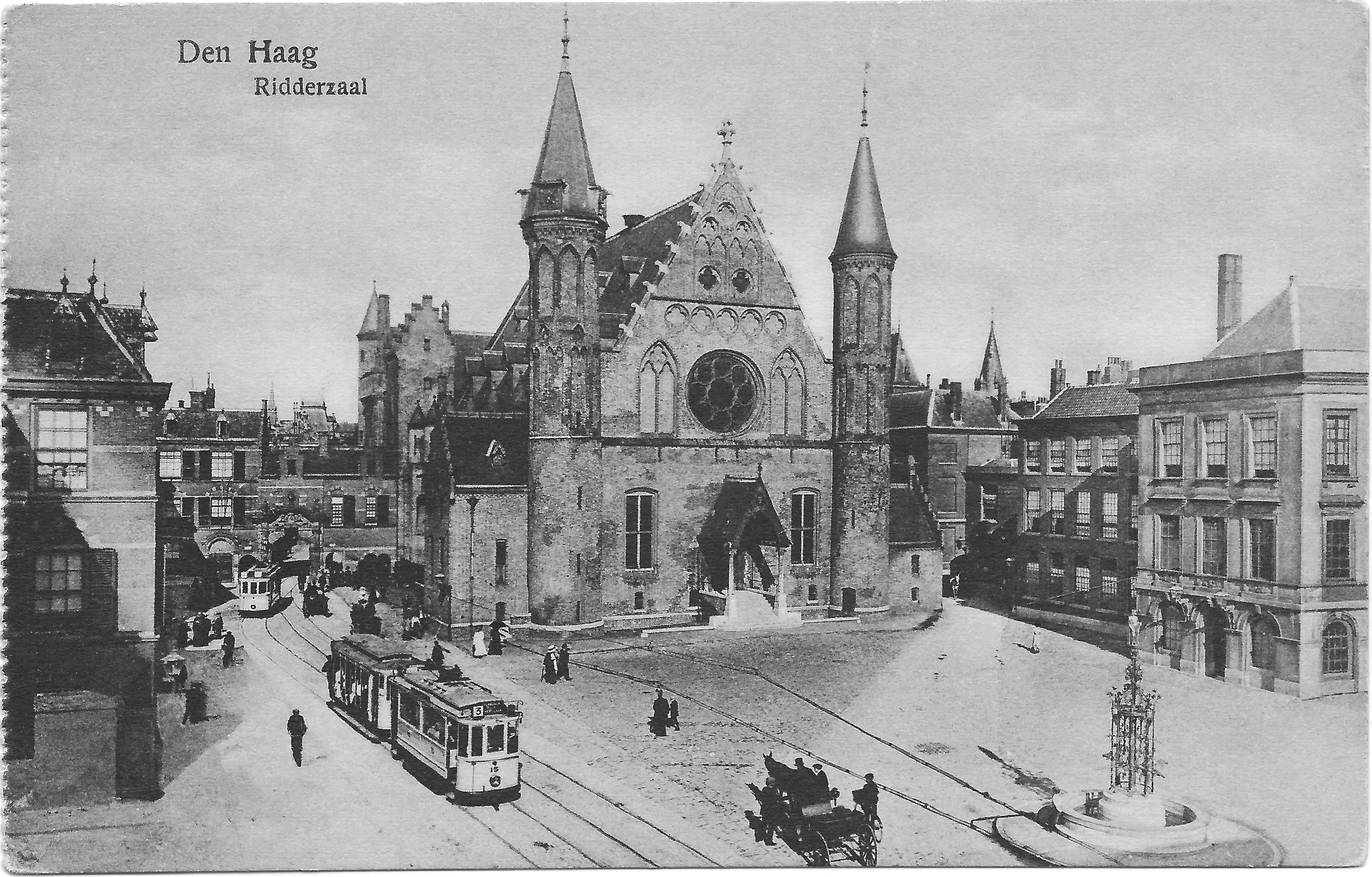 Het binnenhof in de tramtijdperk